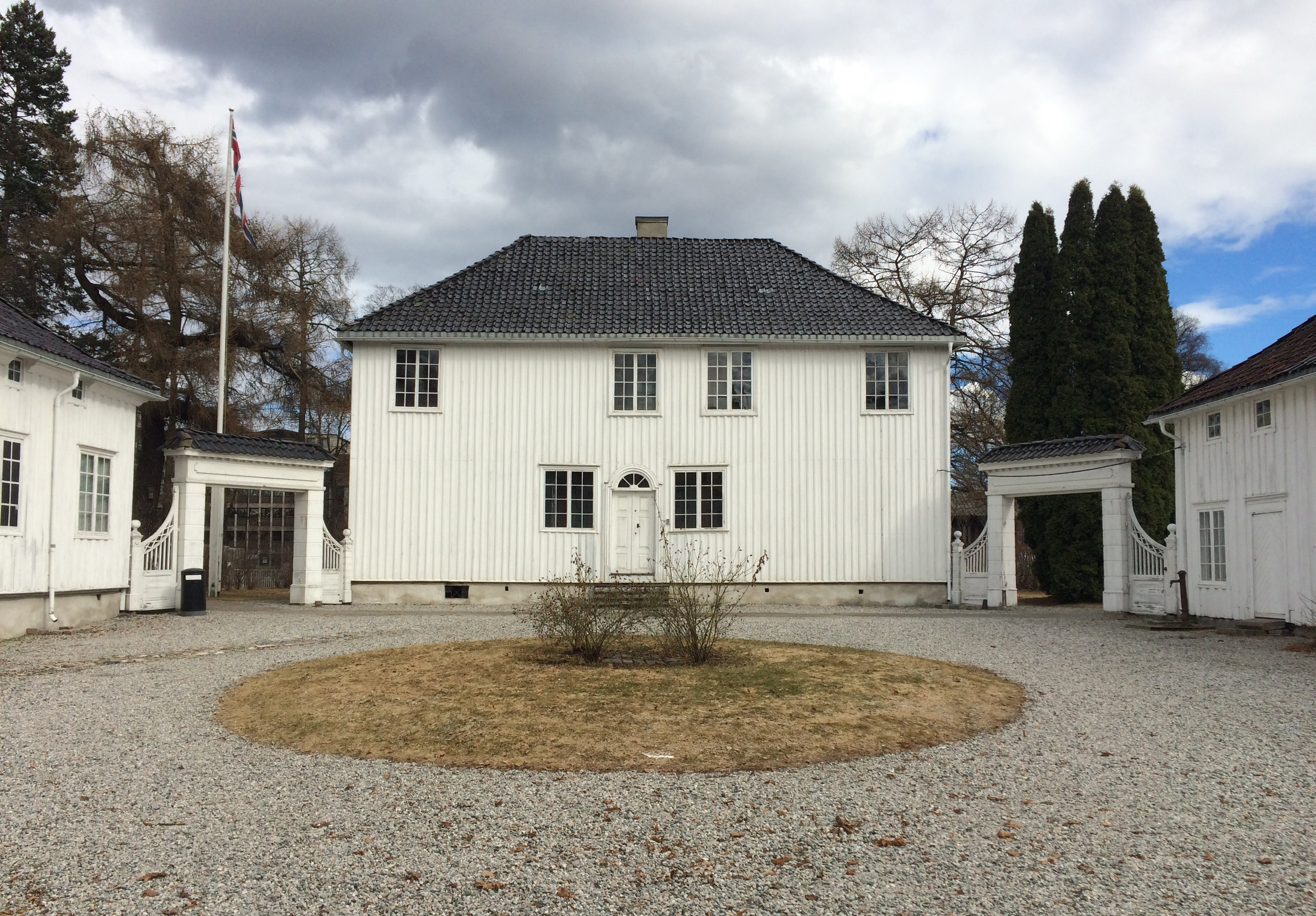 Marienlyst, i dag en del av Drammens museum